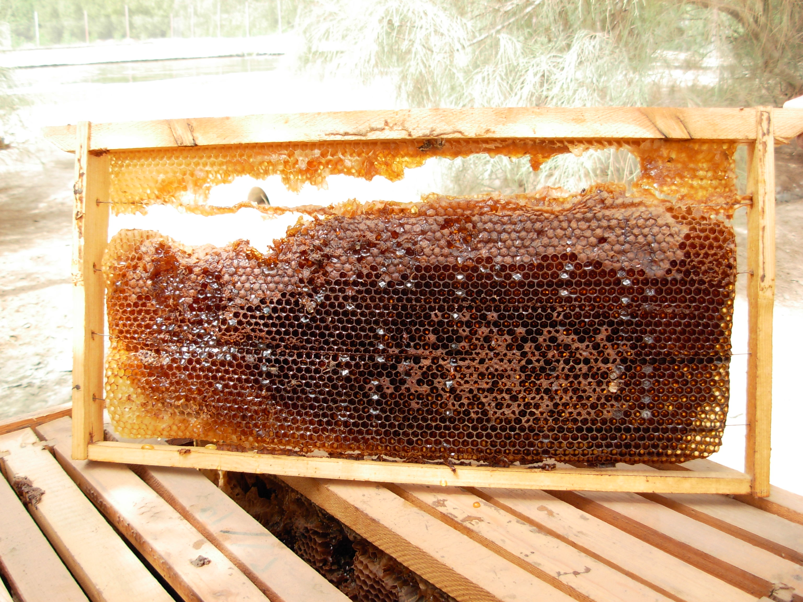 ഞൊടിയൽ തേനീച്ചയുടെ തേനട. കുവൈറ്റ് - ഇറാക്ക് അതിർ‍ത്തിയിലുള്ള അബ്ദലി ഫാമിൽ നിന്നുള്ള പടം.